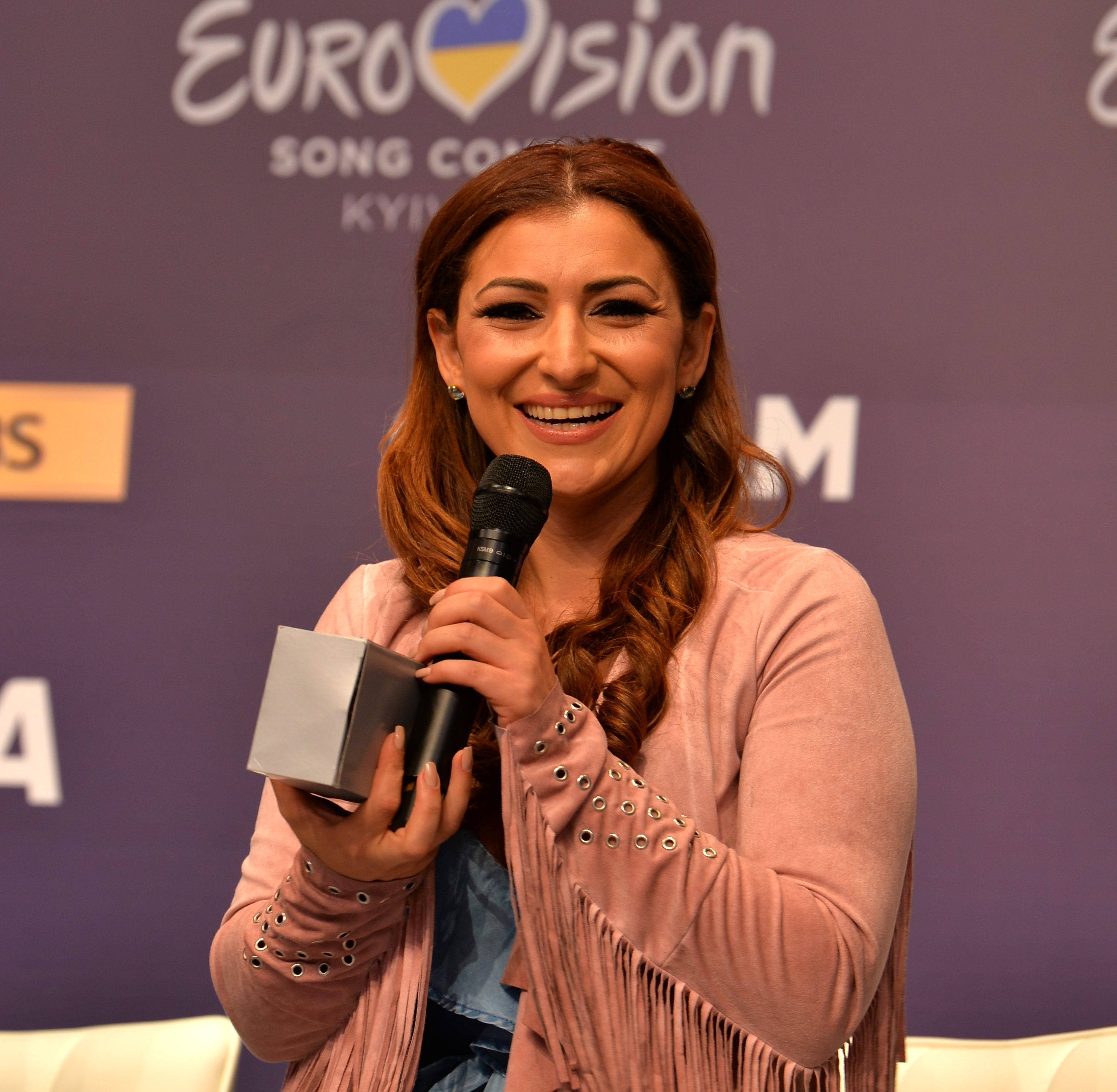 Мальтійська співачка Клавдія Фаньєлло на пісенному конкурсі Євробачення 2017 в Києві